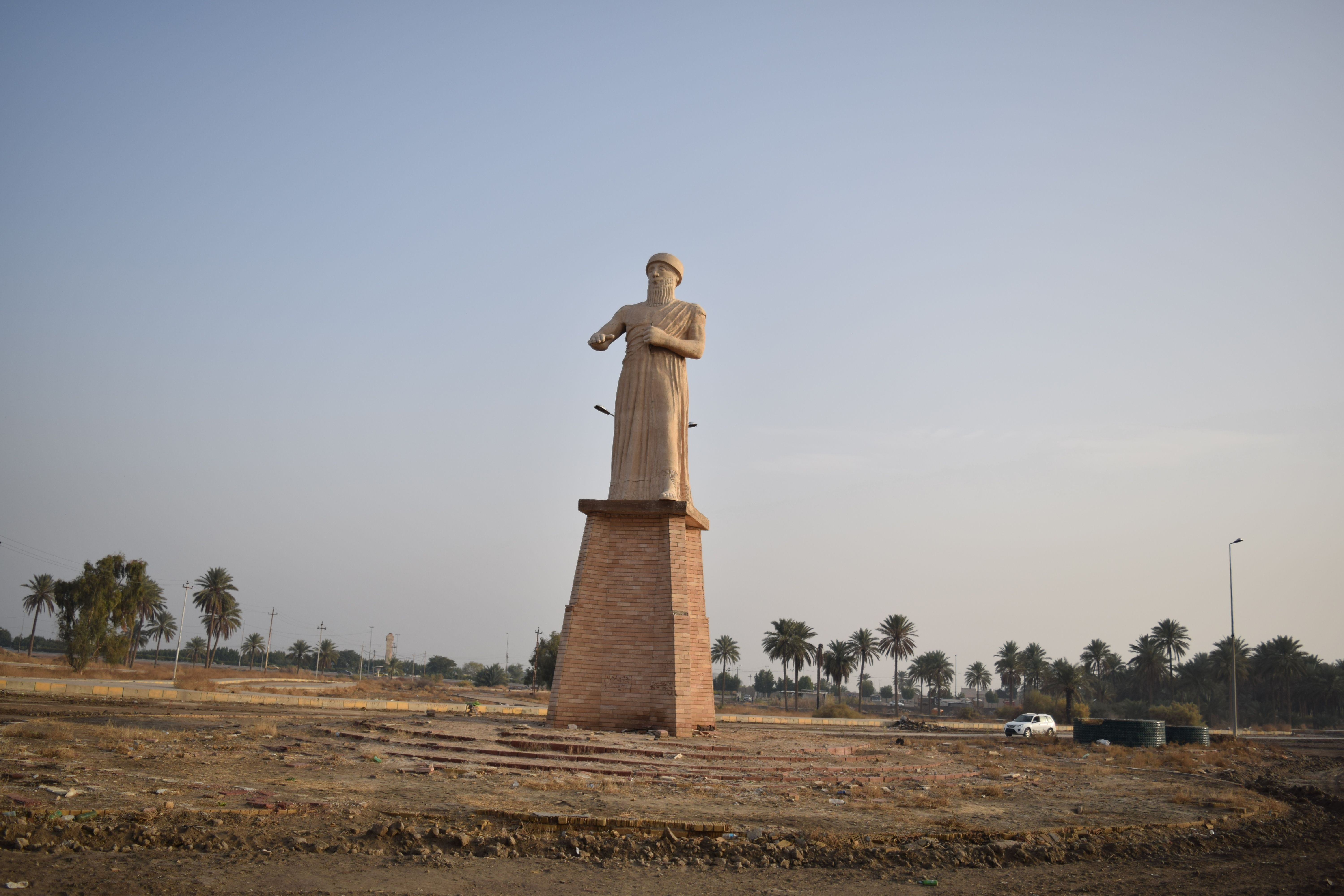 صورة لتمثال حمورابي في الحلة بالقرب من مدينة بابل الأثرية.